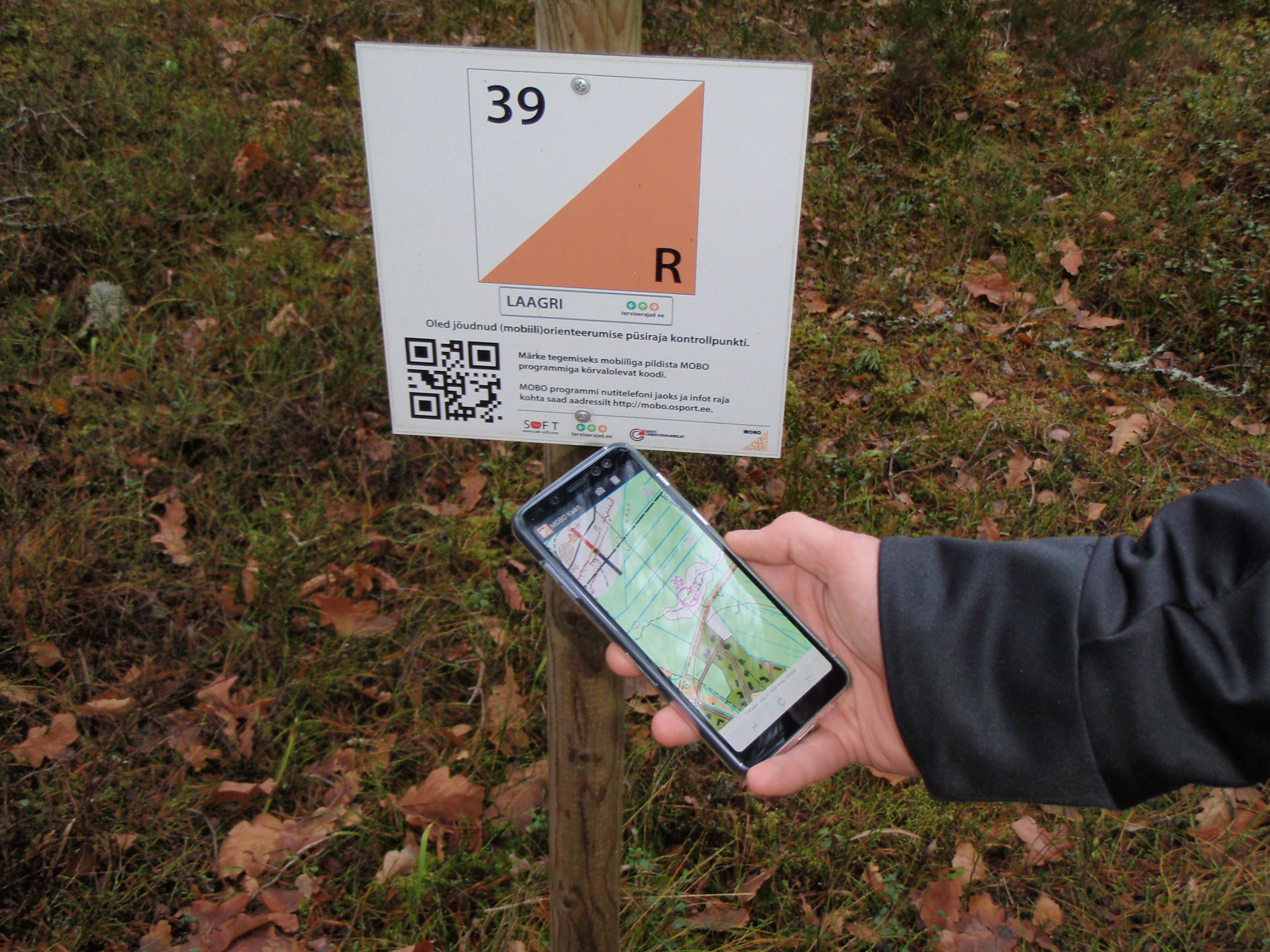 Kontrollpunkt ja kaart telefonis